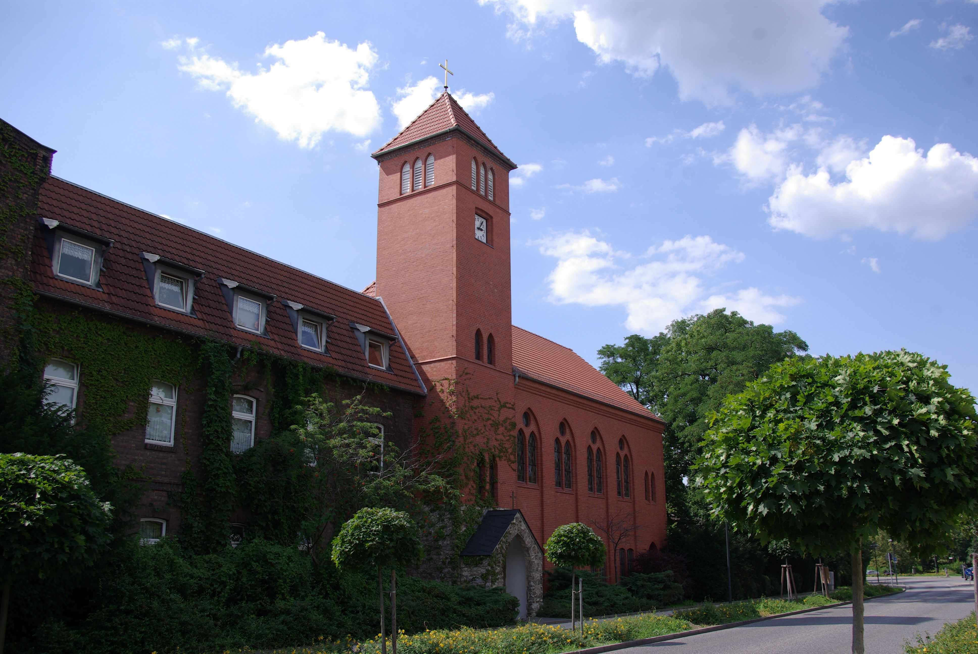 Fürstenwalde/Spree in Brandenburg. Die Samariterkirche der Samariteranstalten ist denkmalgeschützt.